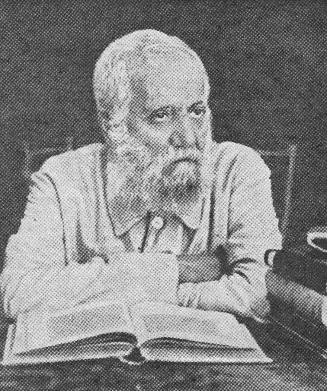 אלכסנדר זיסקינד רבינוביץ'.